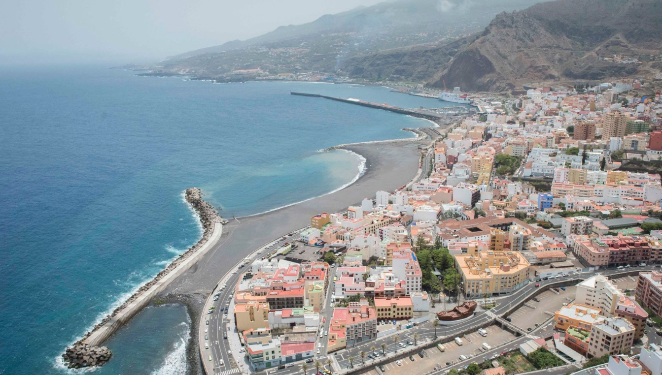 Fotografía tomada desde un helicóptero de la Policia Nacional. Autor